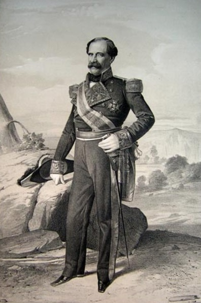 José Jara y García